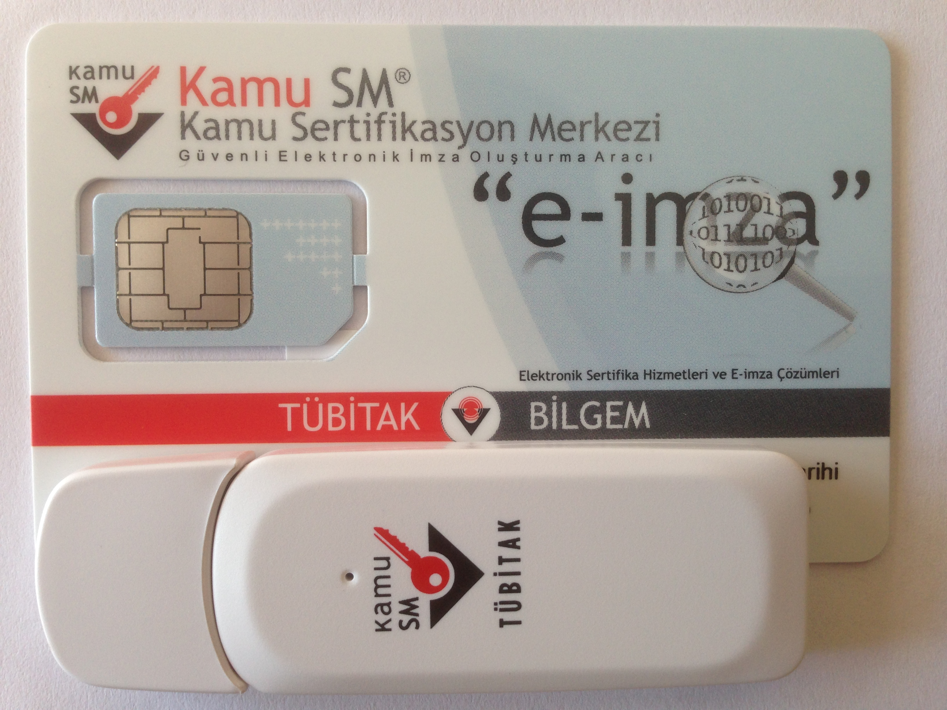 Elektronik imza (e-imza) Güvenli elektronik imza oluşturma aracı - Sim Kart ve USB Bellek